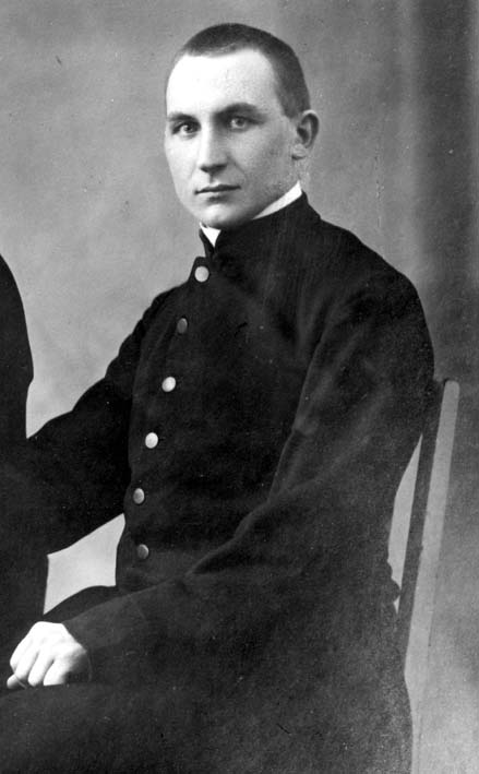 Pfarrer Wilhelm Caroli, Diözese Speyer, verhungert im KZ Dachau, 1942